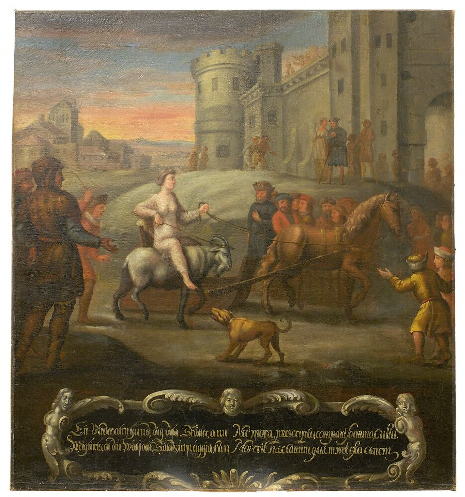 Disasagan, (Lorenz Wolter) - Nationalmuseum